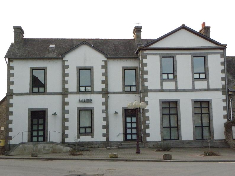 Mairie de Bonnemain (35).